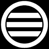 a family emblem named "Maru-no-uchi-ni-mitsuhikiryo"